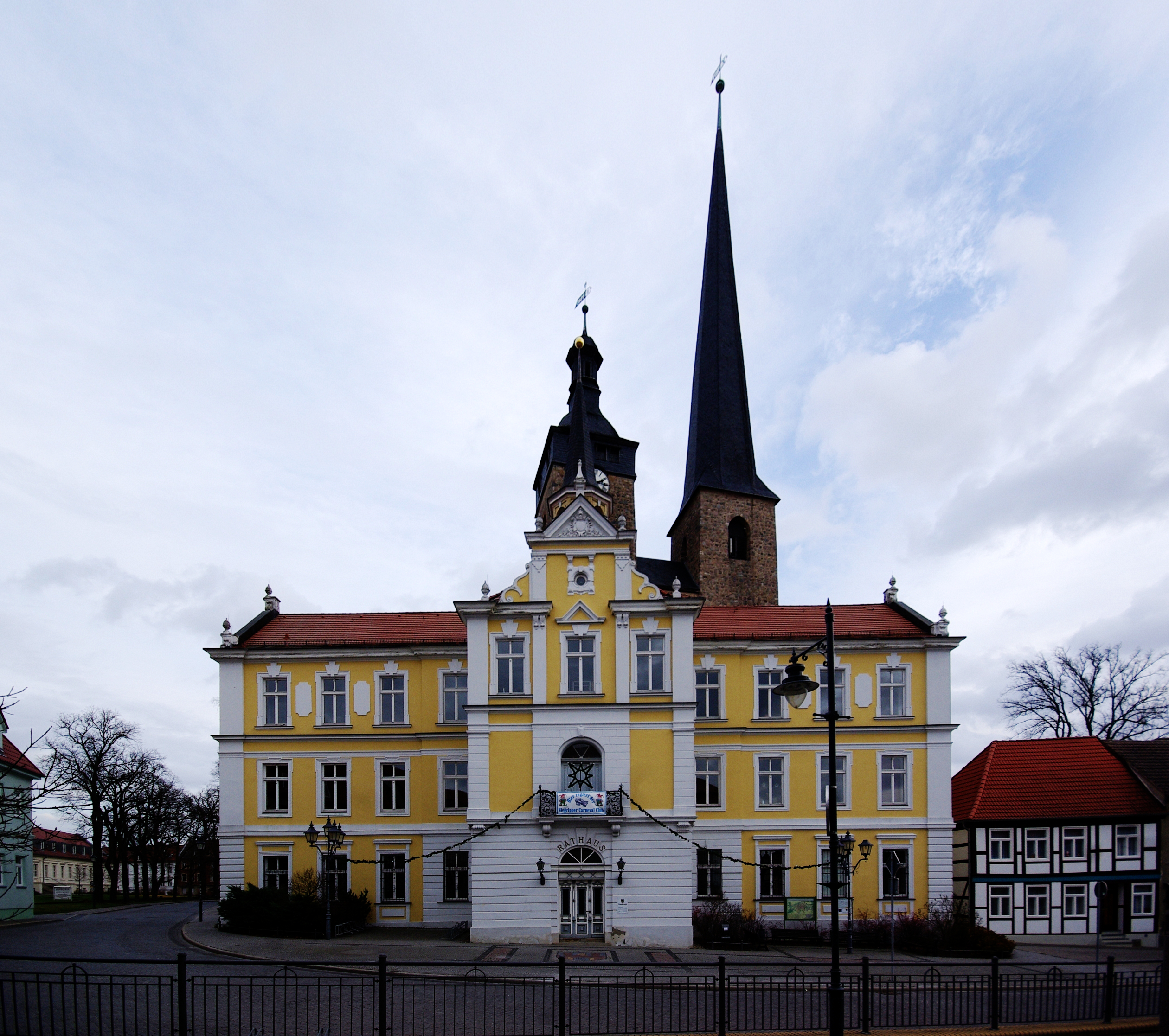 Das Historische Rathaus der Stadt Burg mit Oberkirche "Unser lieben Frauen" im Hintergrund